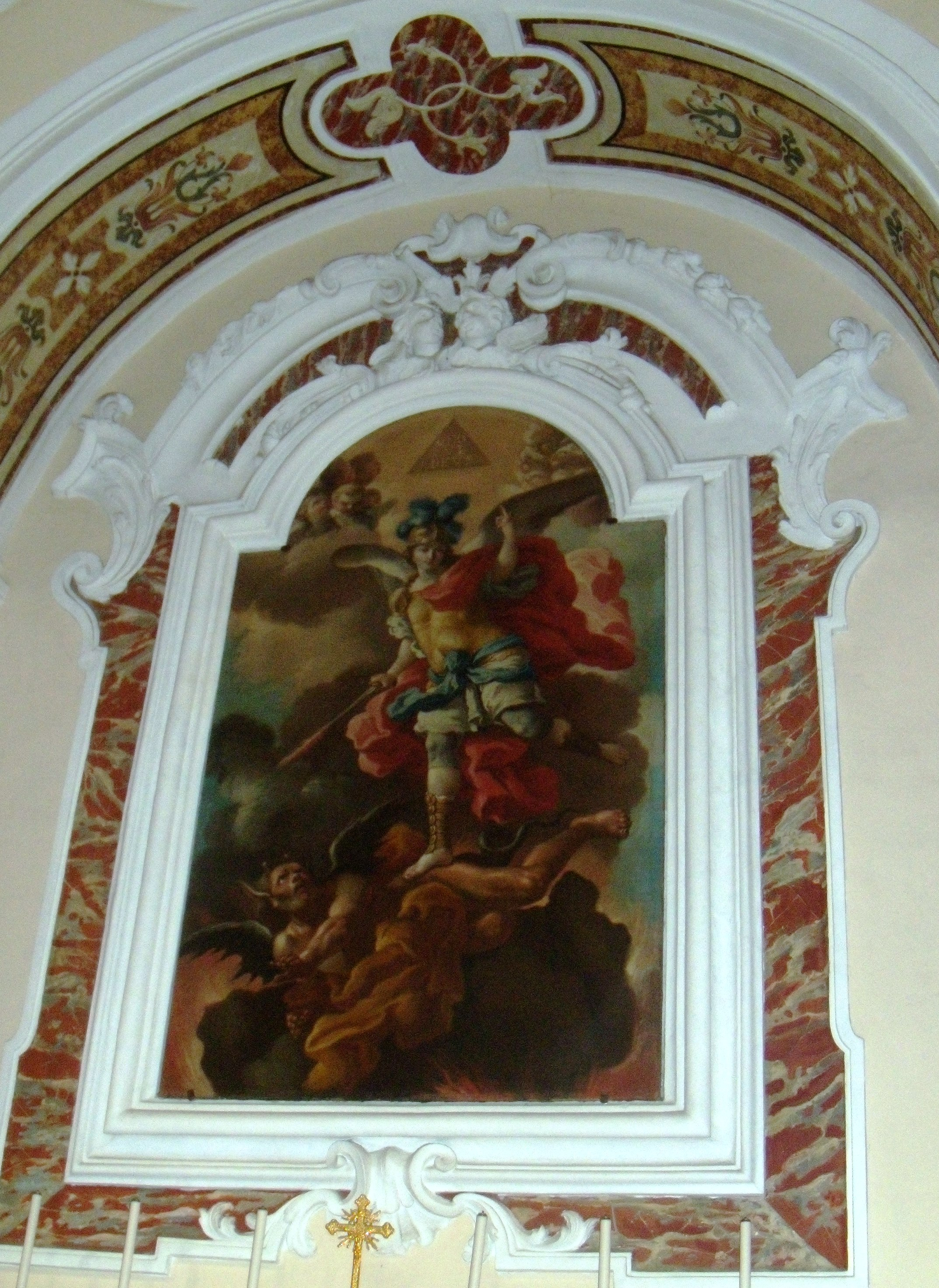 Altare di San Michele Arcangelo nella Cattedrale di Cerreto Sannita (Italia).